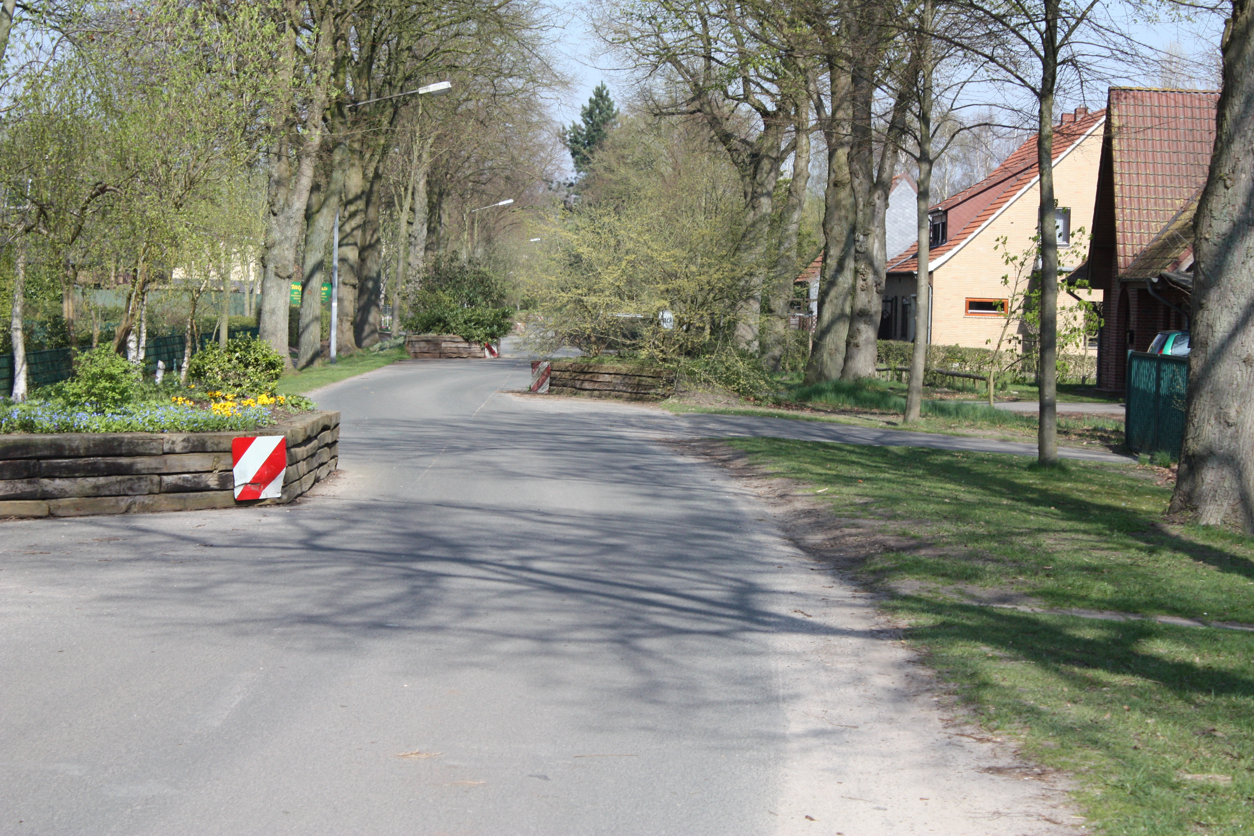 Gessel